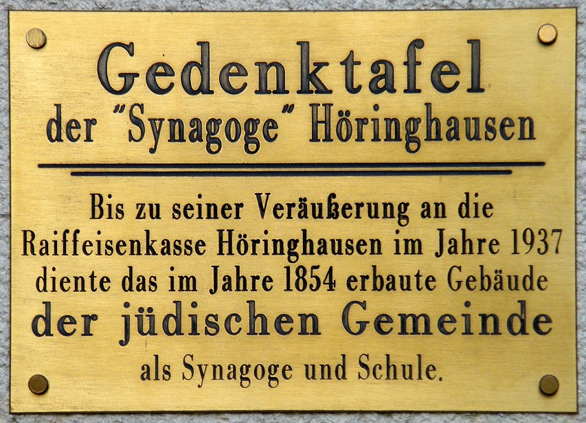 Gedenktafel ehem. Synagoge in Waldeck-Höringhausen